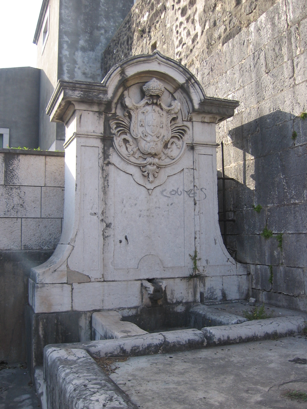 Chafariz da Buraca, Benfica, Lisboa.